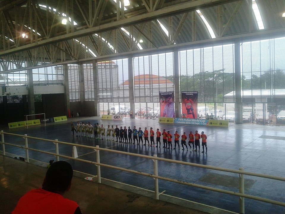 Encuentro de semifinal entre el Lyon y el Bucaramanga